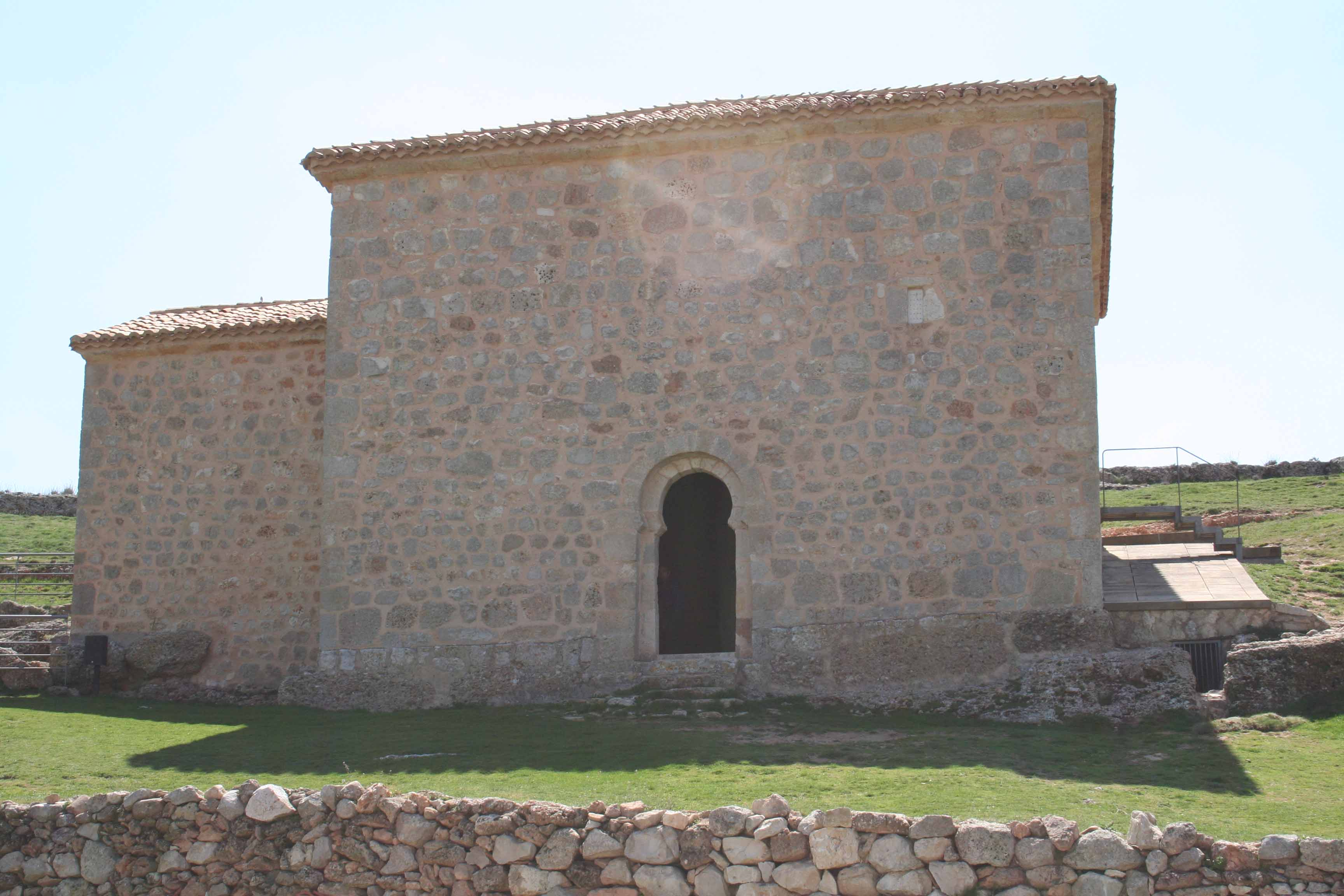 Vista exterior de la ermita de San Baudelio de Berlanga